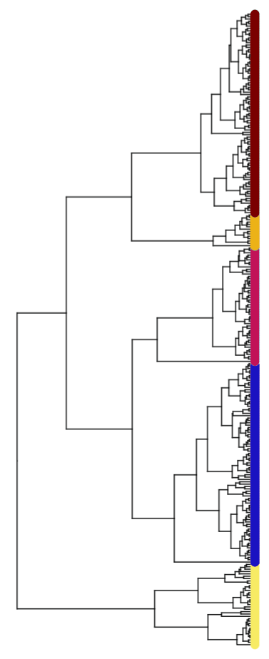 Пример иерархической кластеризации исследуемых клеток по профилю экспрессии. Цветом выделены кластеры однородных по экспрессии клеток.